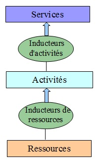 Ce schema est une representation graphique de la méthode ABC